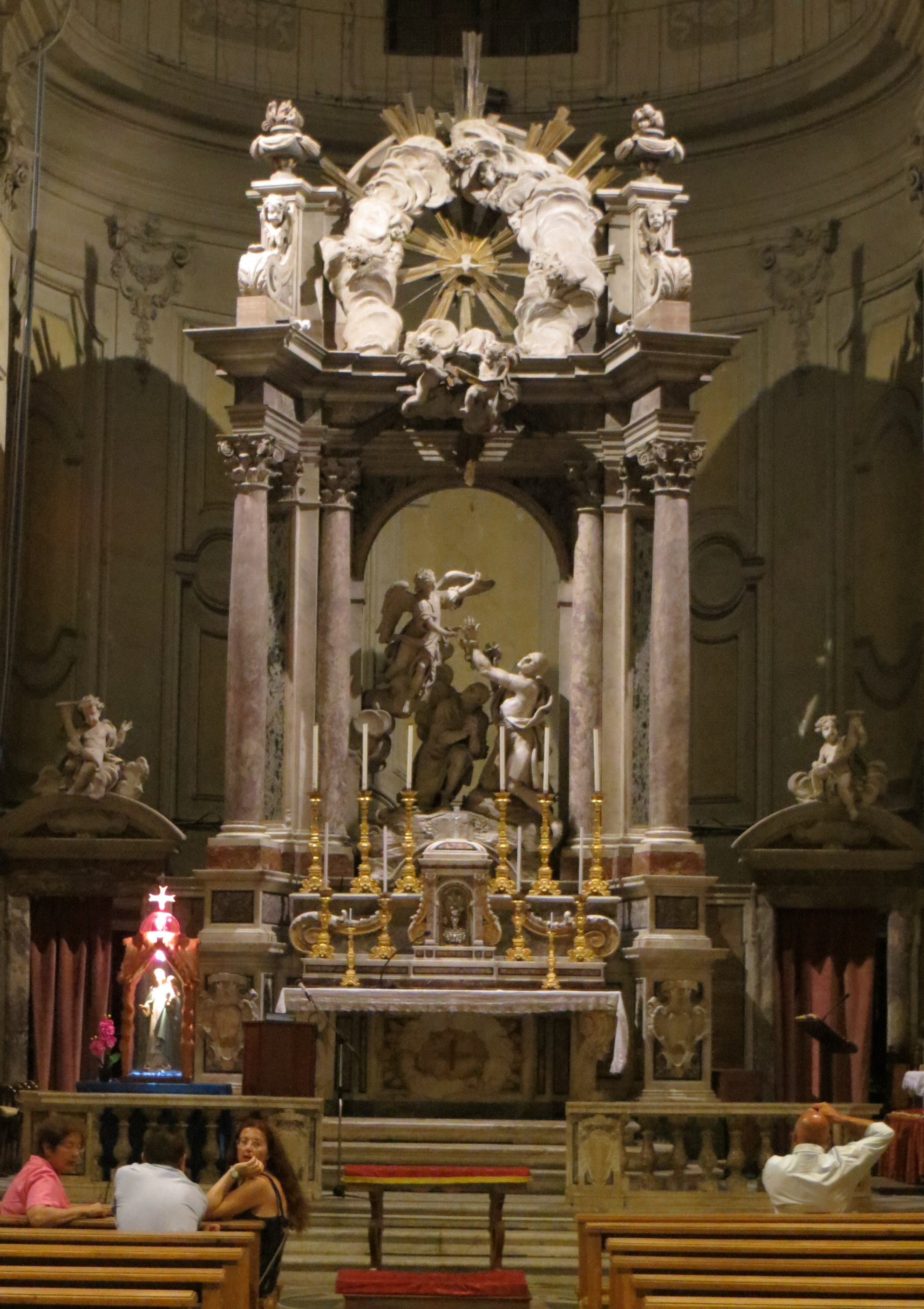 Altare della Chiesa di San Ferdinando a Livorno